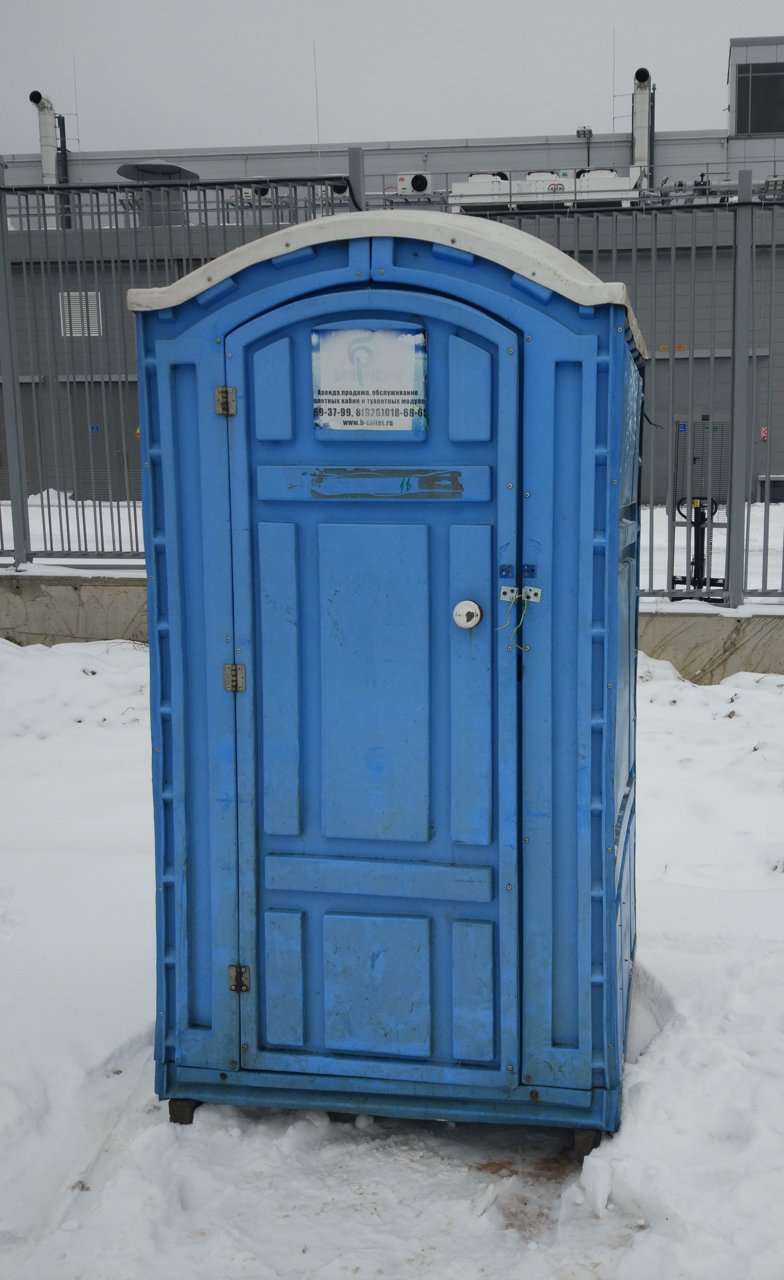 Синяя пластиковая туалетная кабинка, установленная на грунт